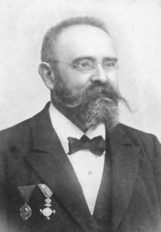 Jan Tiray (1858 - 1925), Český učitel, hudebník a publicista.